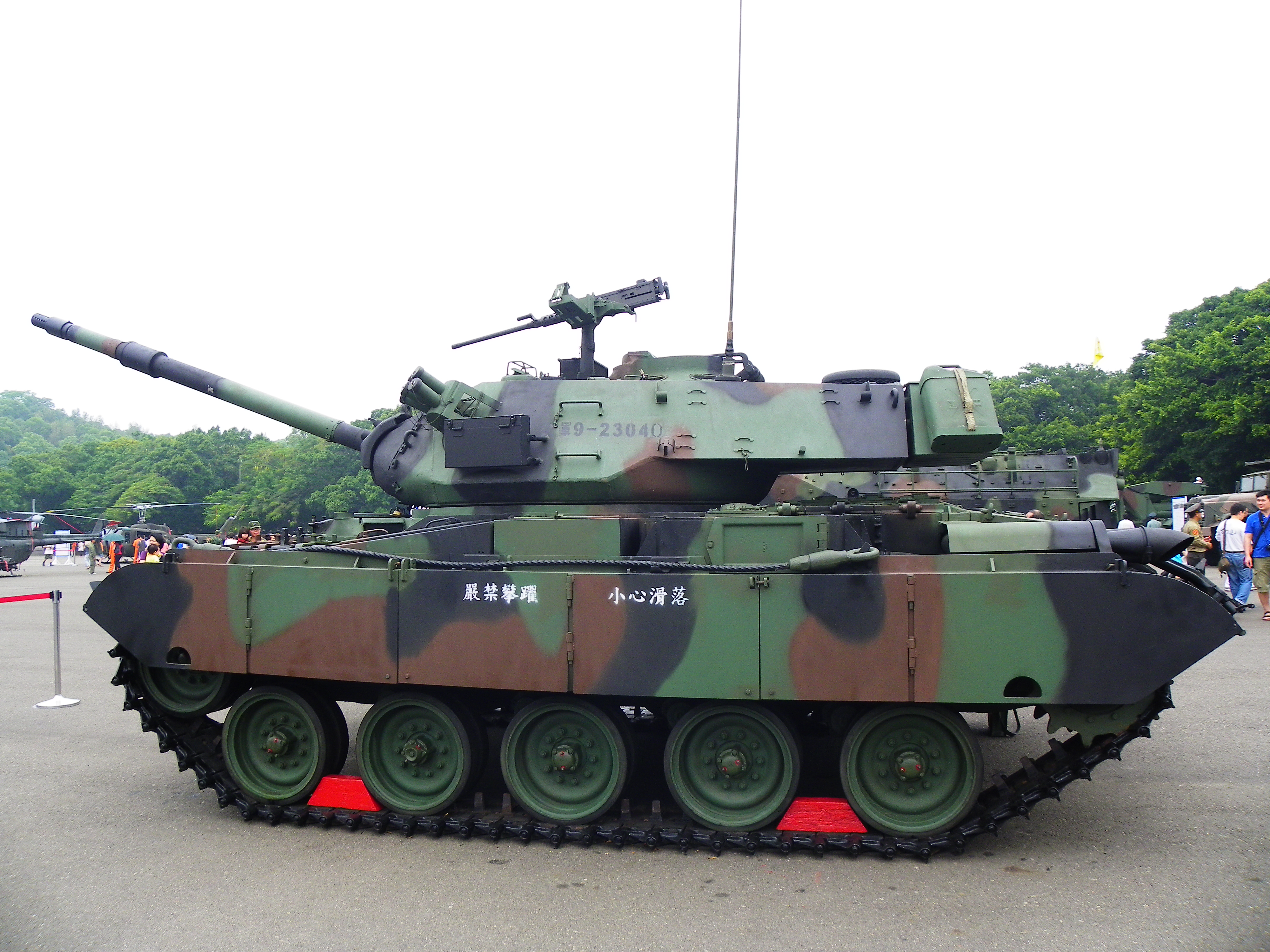 成功嶺展示的M41D輕戰車左側。